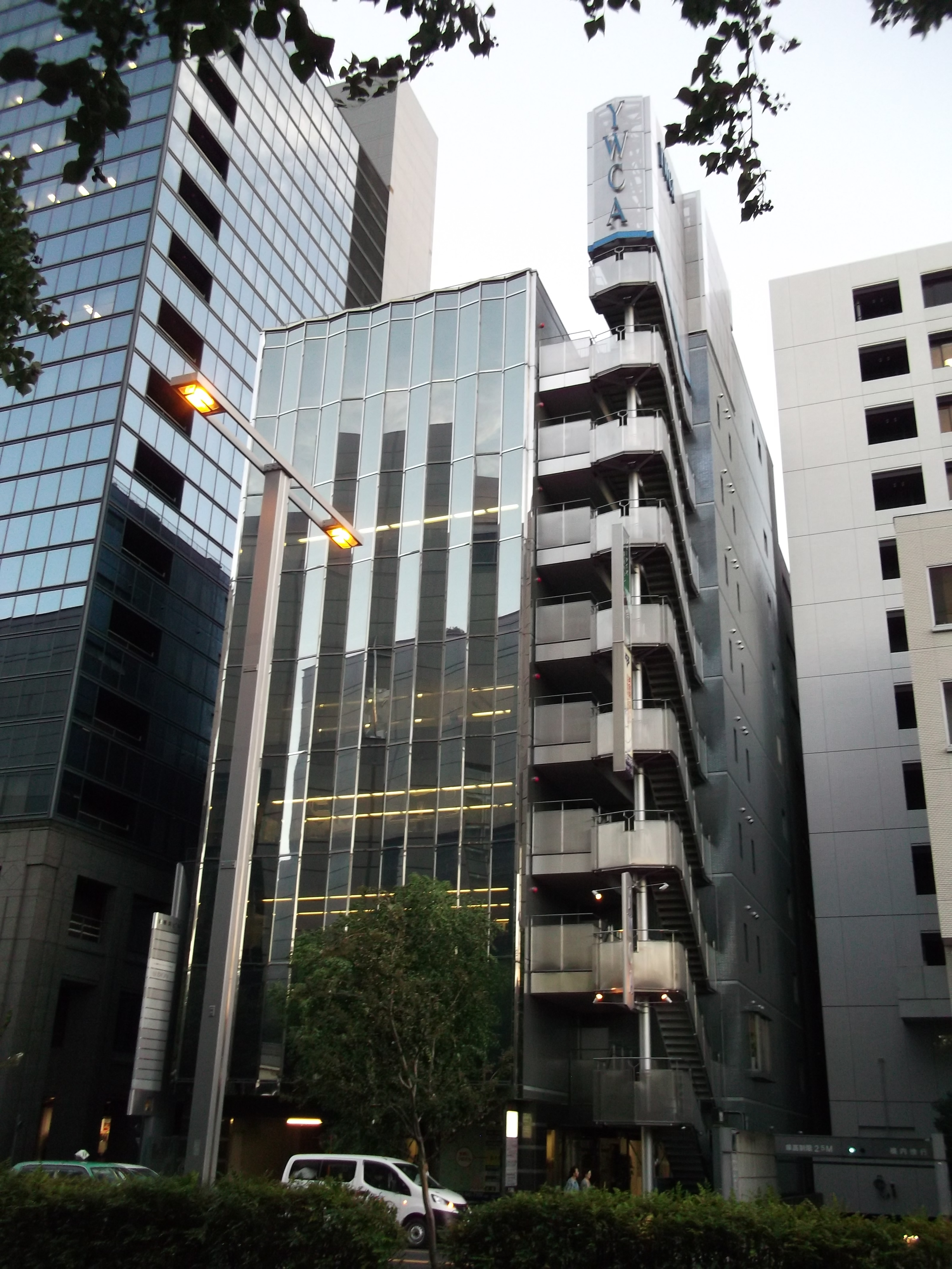 名古屋市中区新栄町二丁目のYMCAビルを北側公道より撮影